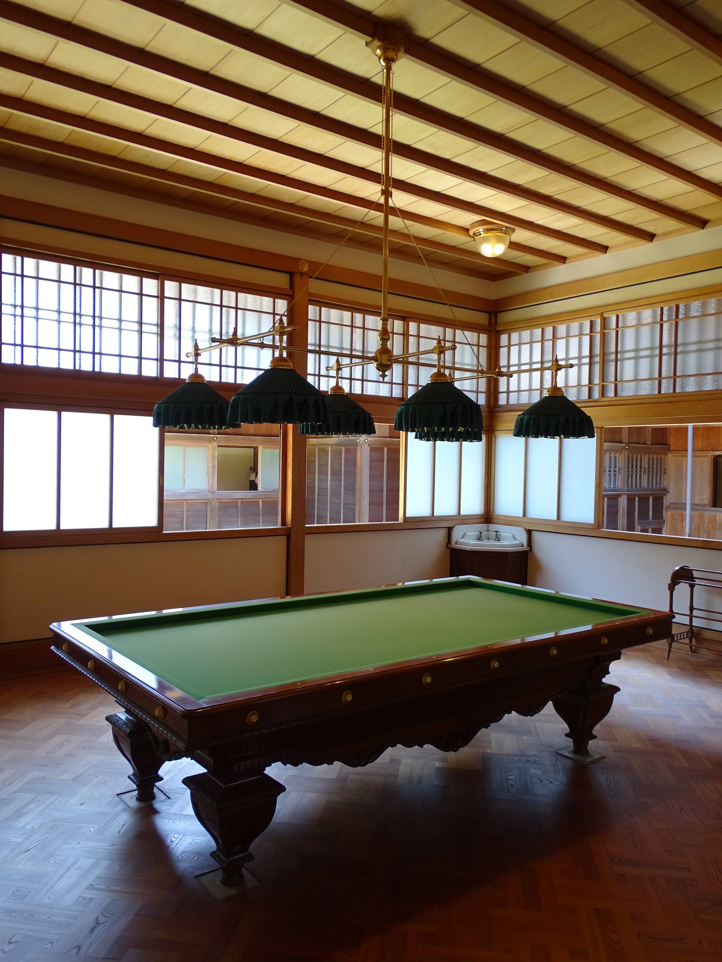 Billiard Room - Nikko Tamozawa Imperial Villa - Nikko - Japan